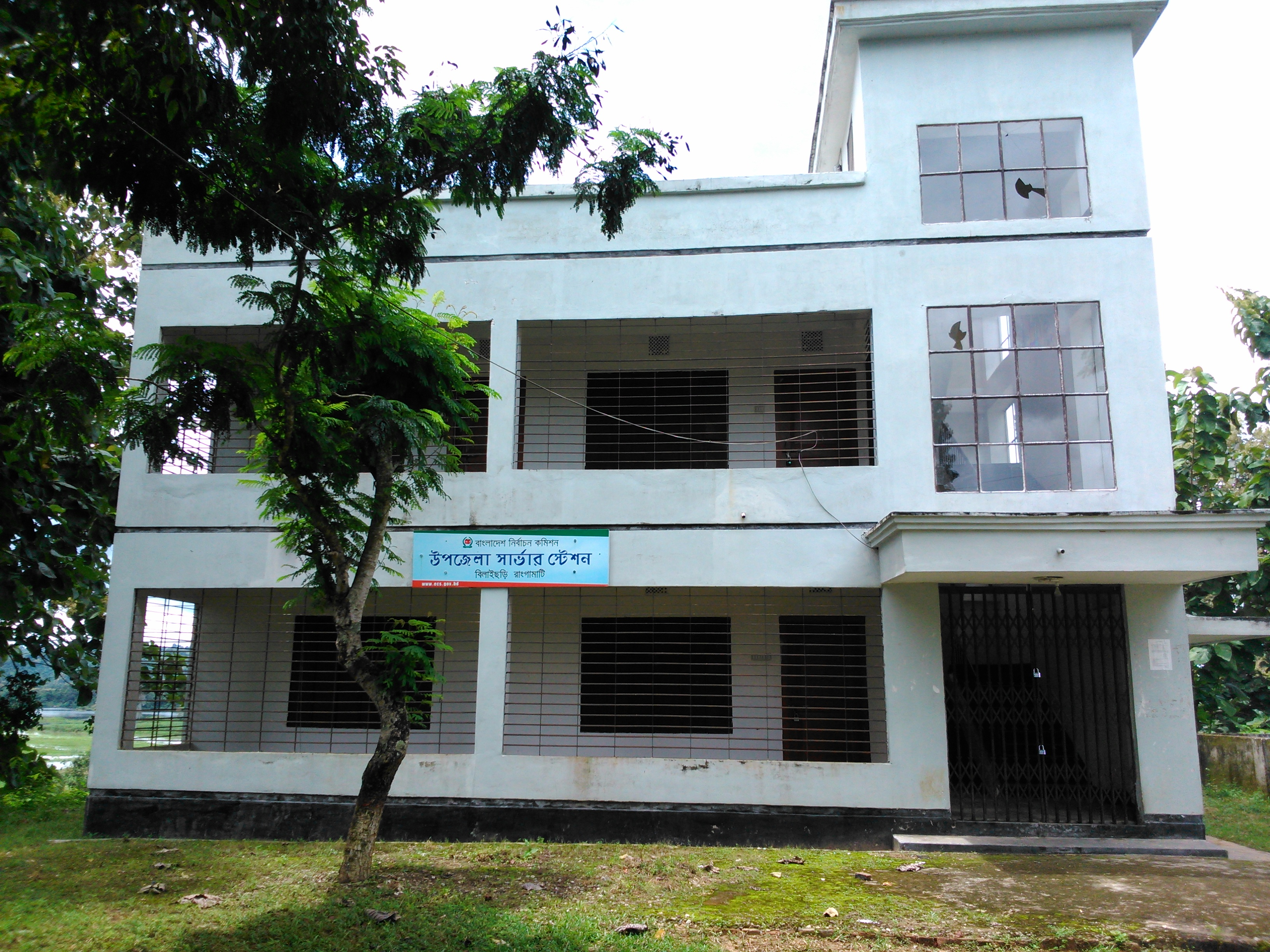 বিলাইছড়ি উপজেলাতে অবস্থিত বাংলাদেশ নির্বাচন কমিশনের অফিস